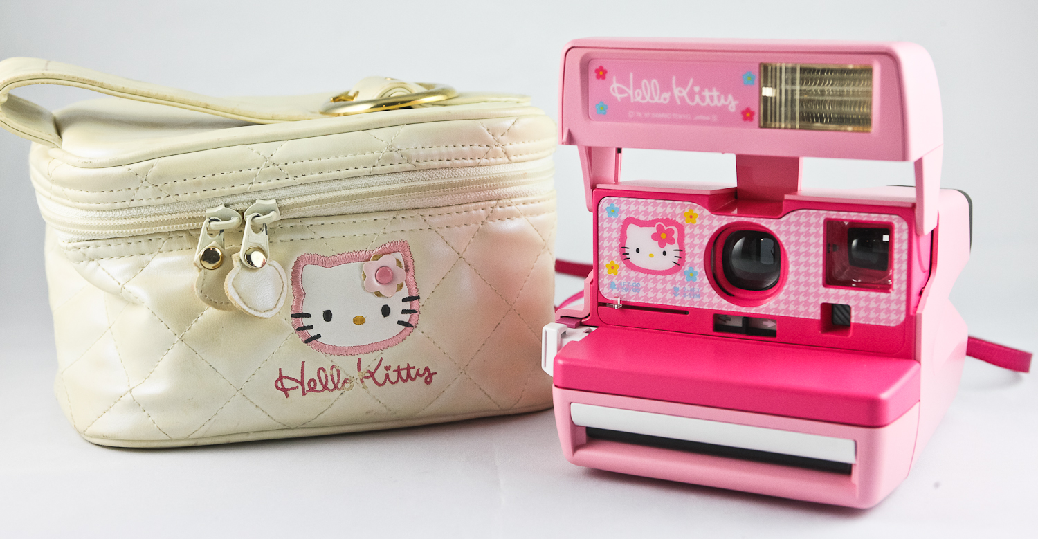 0475 Polaroid 600 Hello Kitty